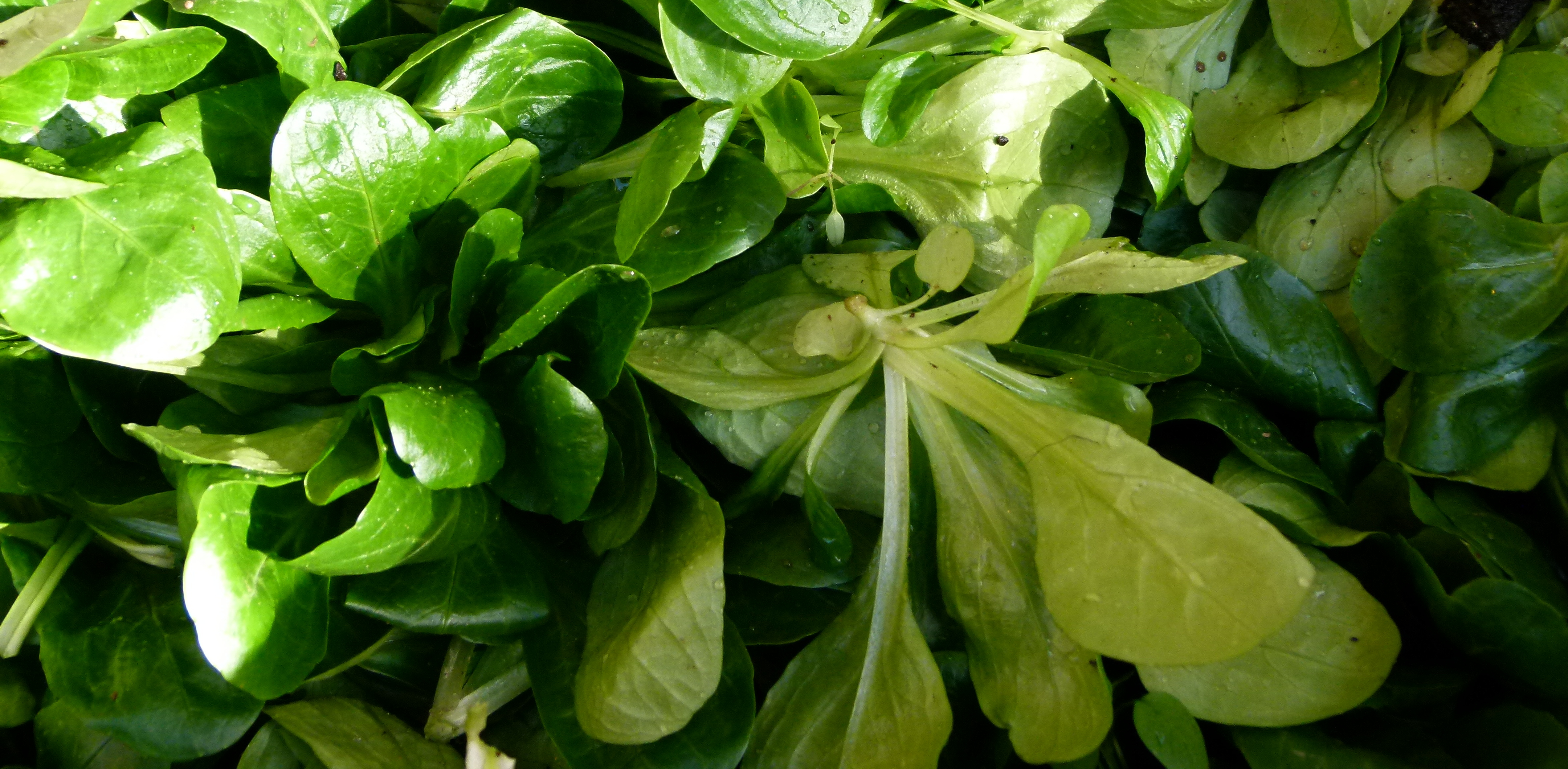 Au marché - mâche